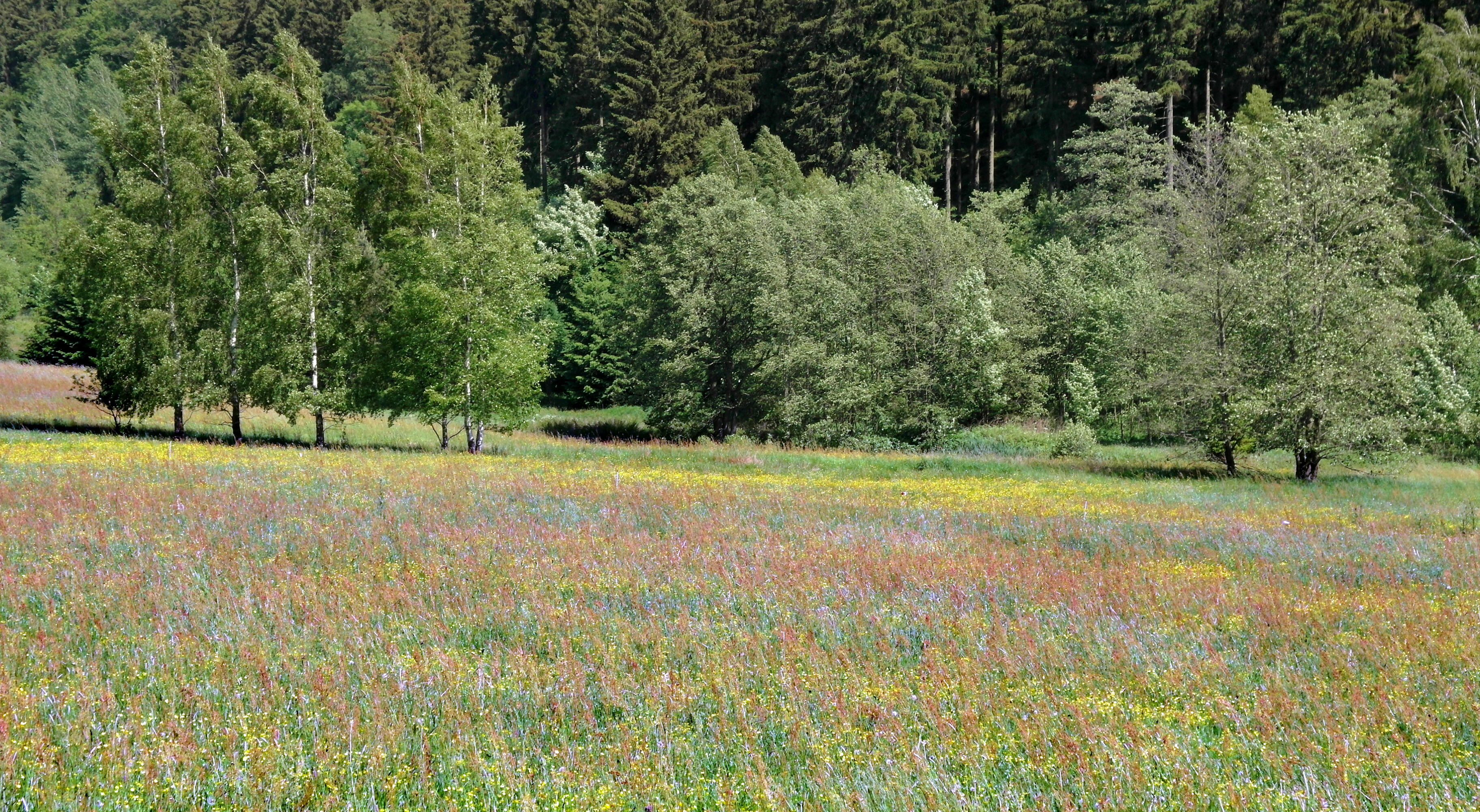 28.05.2018 01744 Oberpöbel (Dippoldiswalde): Wiesenaue (GMP: 50.780163,13.670142) am Pöbelbach unweit der Putzmühle, Sicht nach Norden. [SAM6520.JPG]20180528305DR.JPG(c)Blobelt